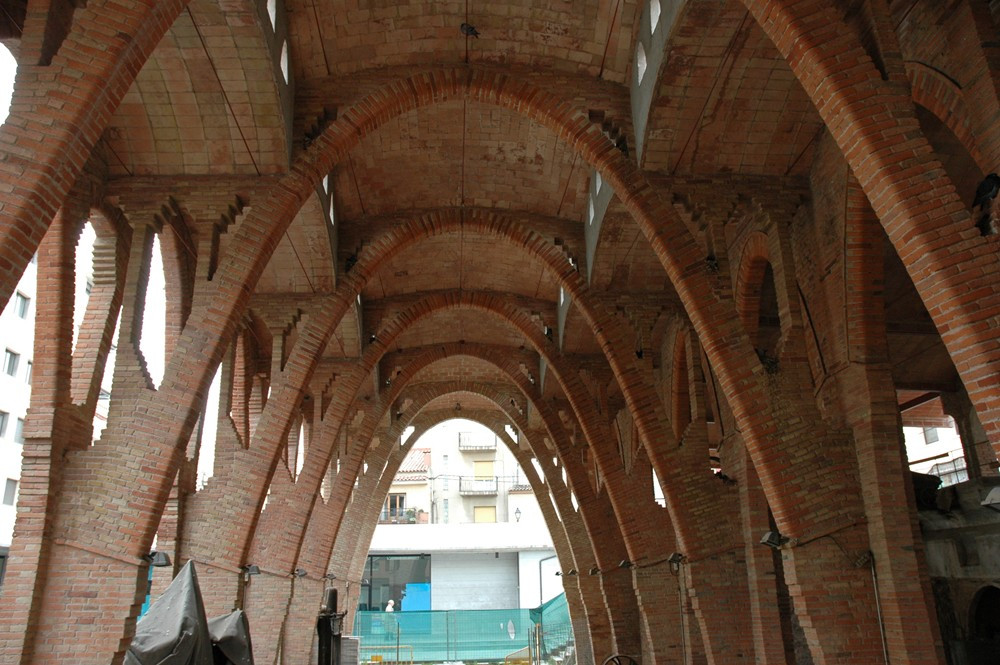 Celler de Sant Cugat (by Cèsar Martinell i Brunet)